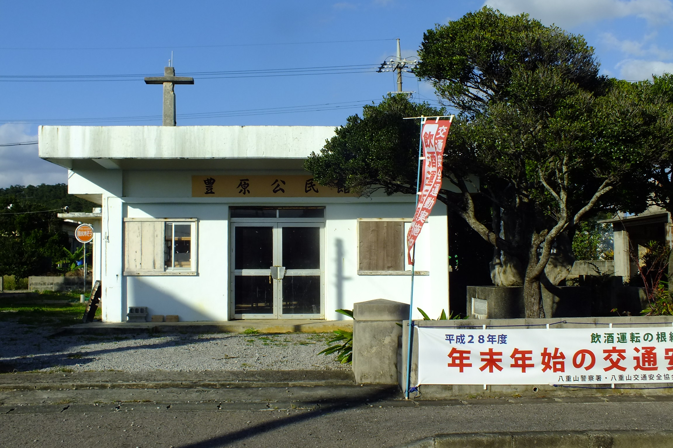 2017-01-26 Toyohara Kominkan,Iriomotejima 西表島豊原公民館